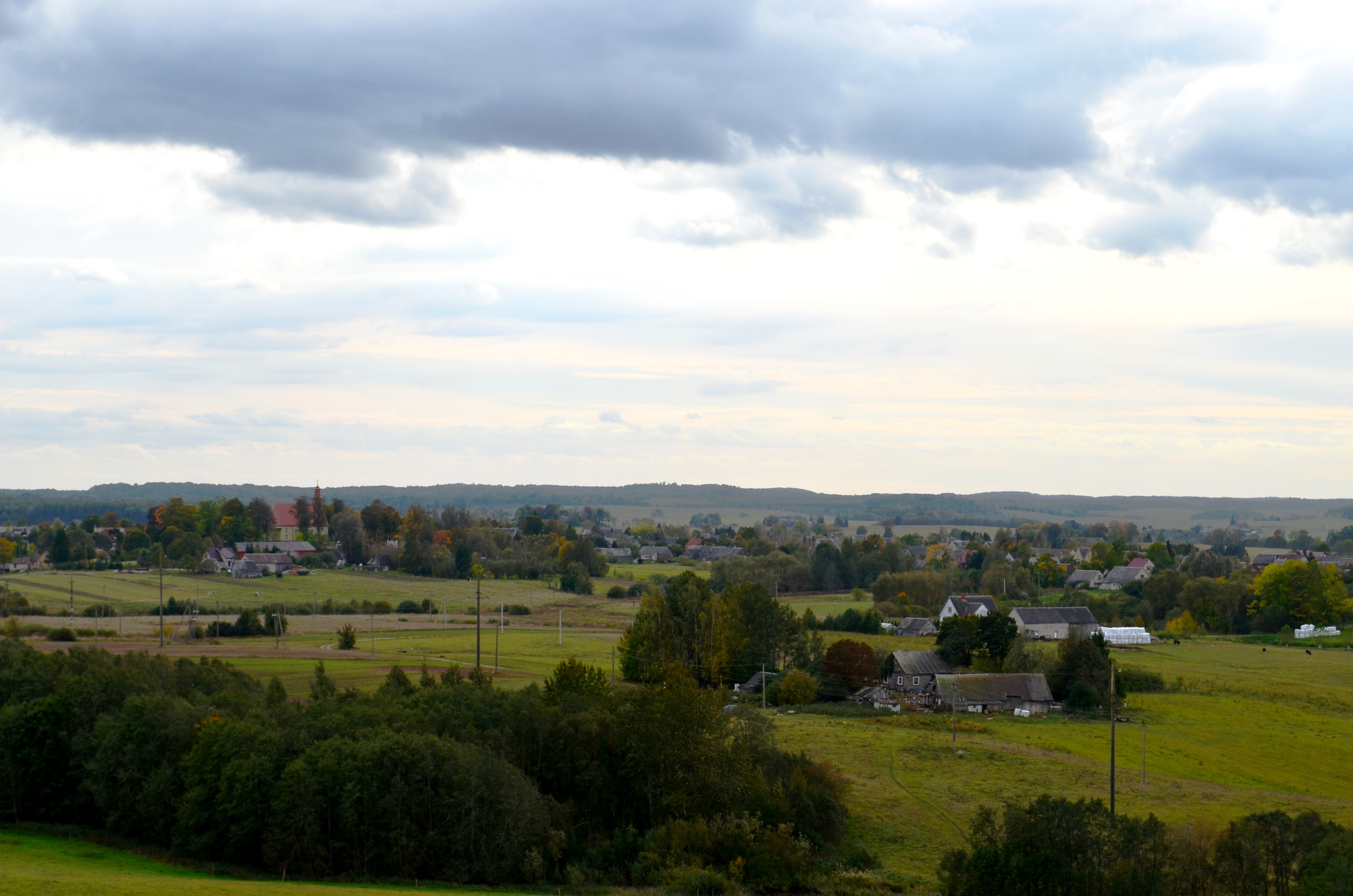 Pavandenė ir Miestalis nuo Sprūdės piliakalnio, Telšių raj.